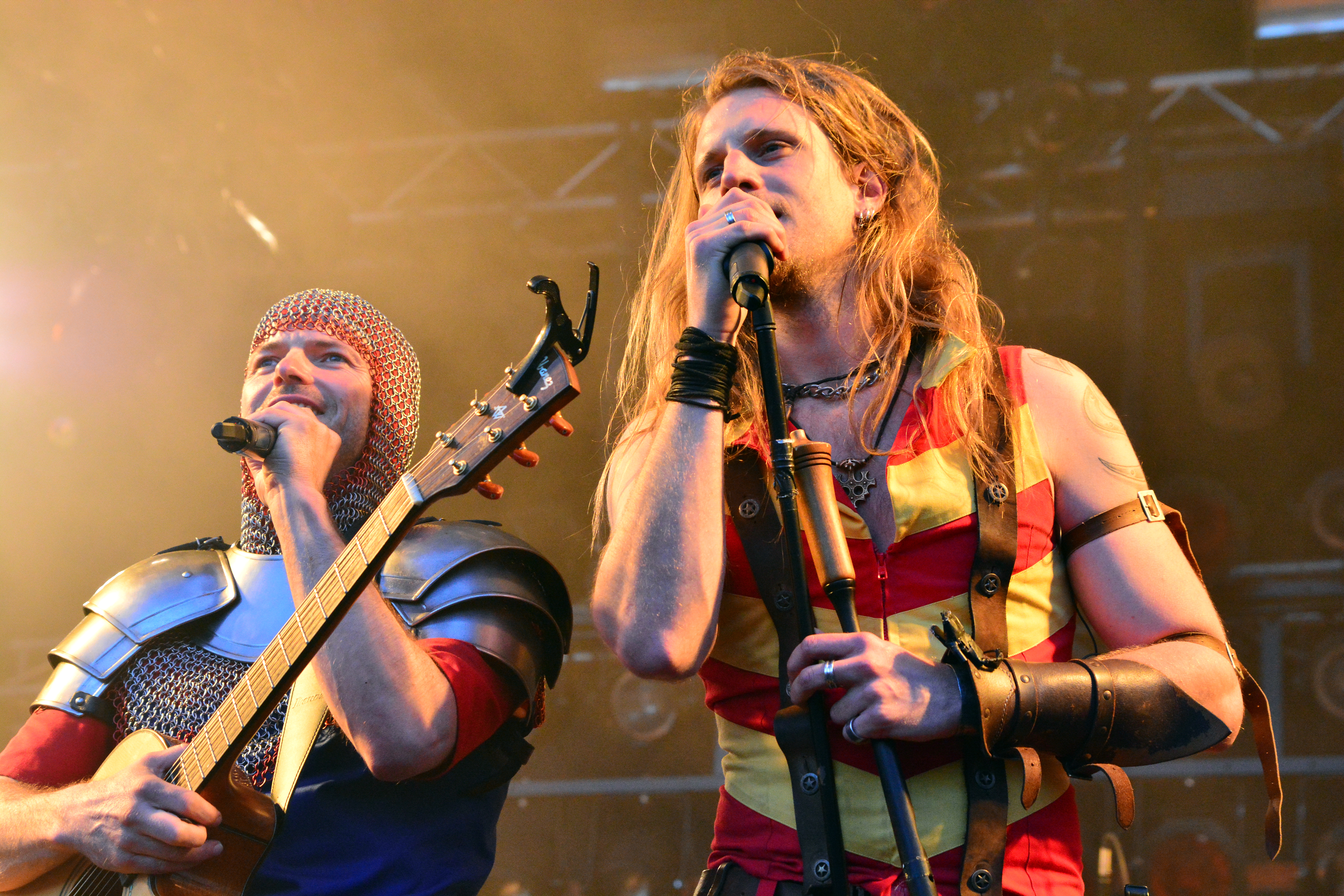 Feuerschwanz beim Hafen Rock 2015 in Hamburg